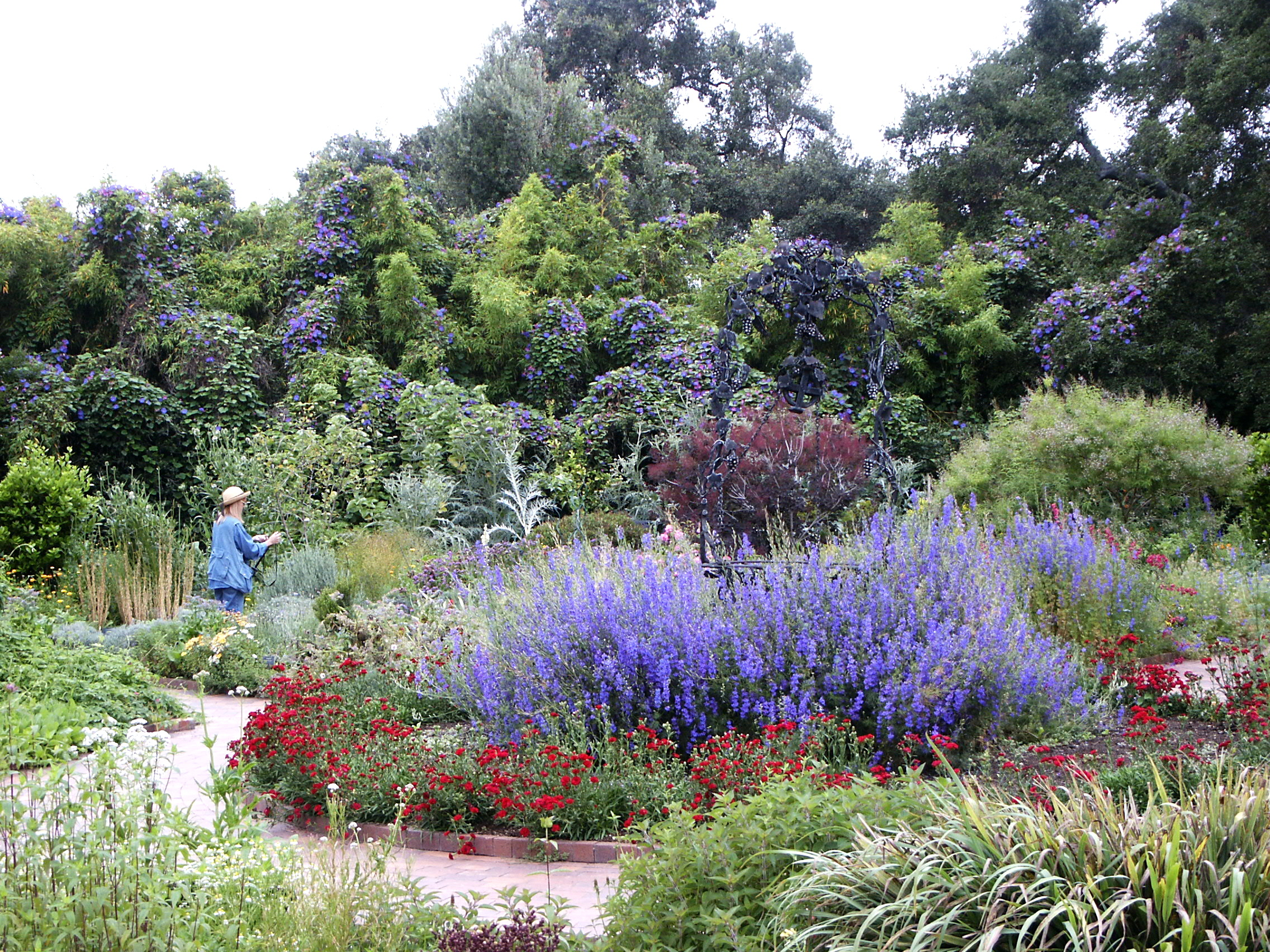 Herb Garden, Huntington Library